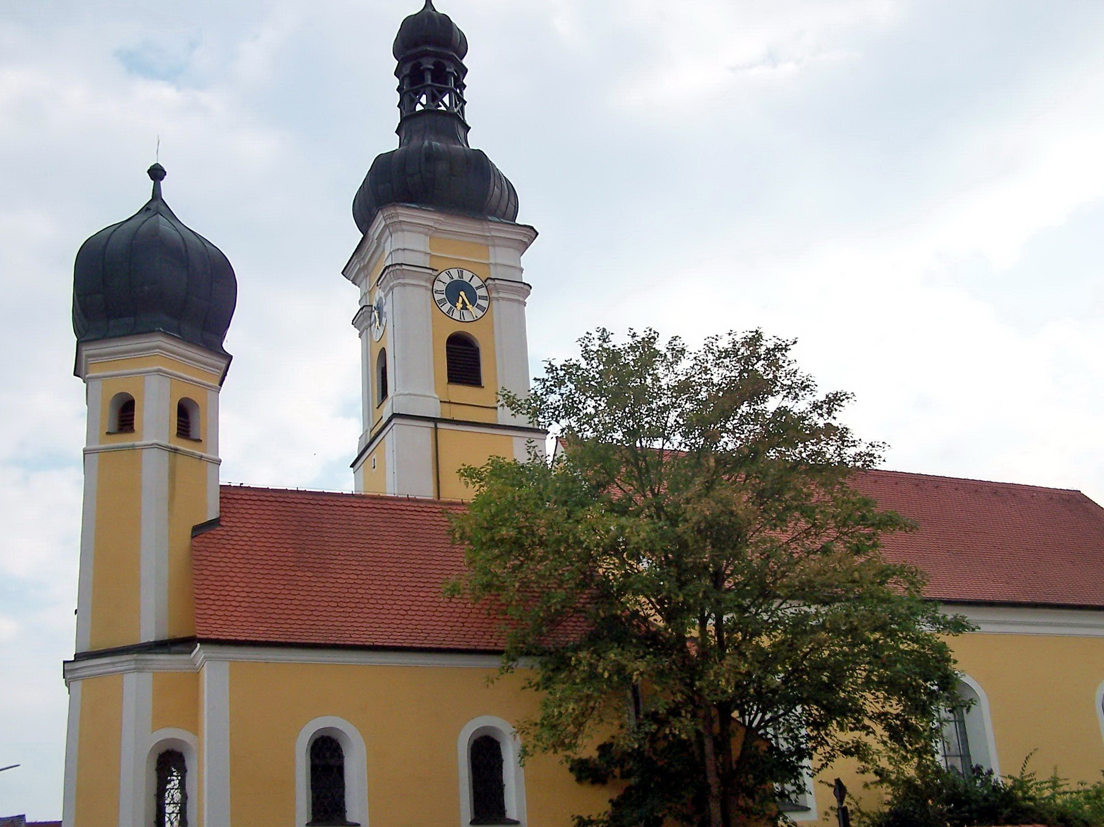 Mintraching. Katholische Pfarrkirche St. Mauritius, Saalbau mit eingezogenem Chor, letztes Drittel 17. Jahrhundert, Turm Mitte 18. Jh; katholische Nebenkirche St. Leonhard